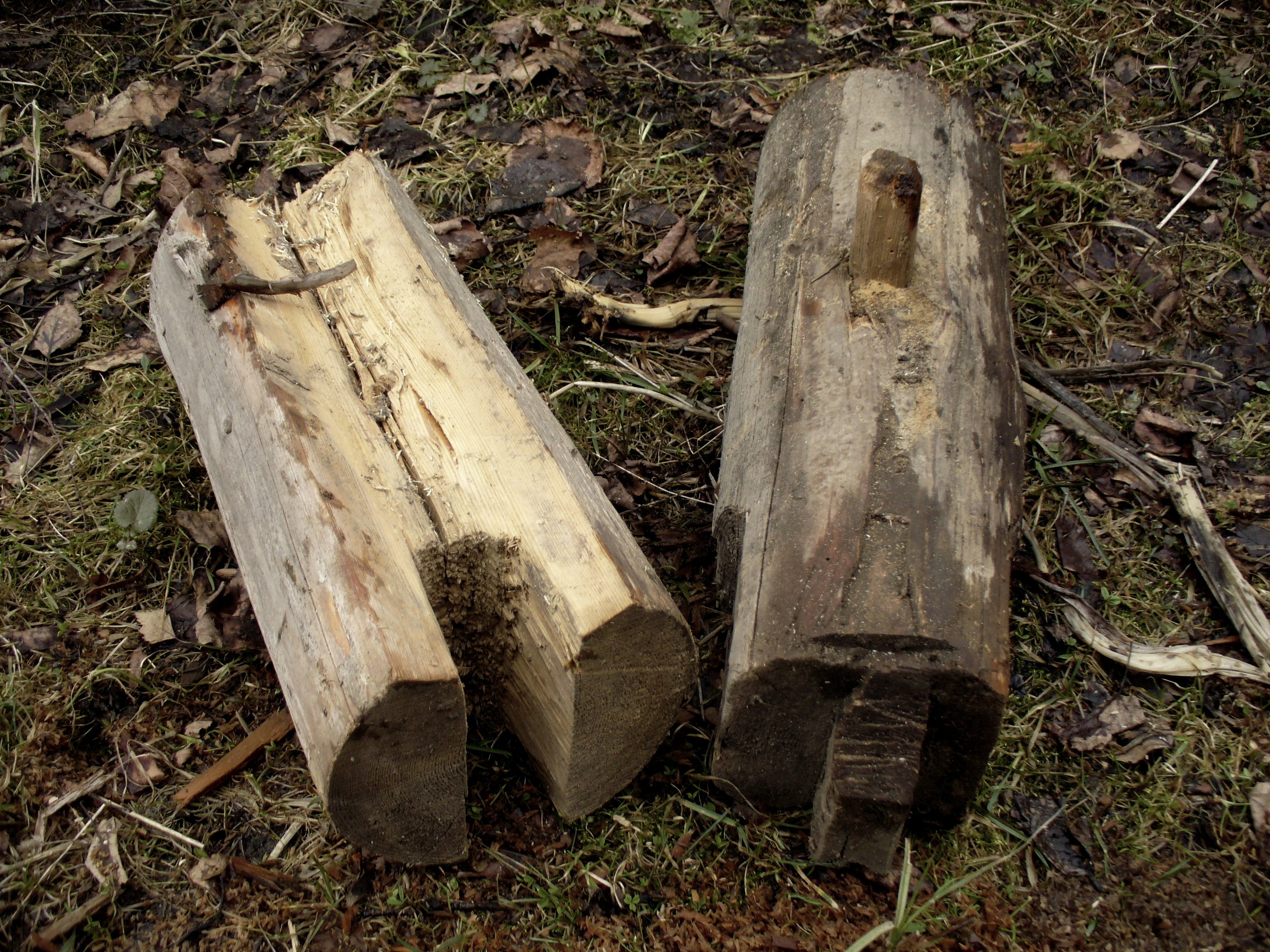 Фрагменты брёвен сруба. Соединение по длине на прямой шип.